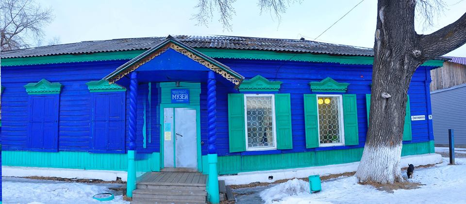 Музей города Бабушкин